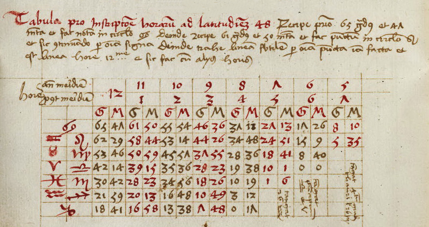 Table de hauteurs du Soleil pour une latitude de 48°.